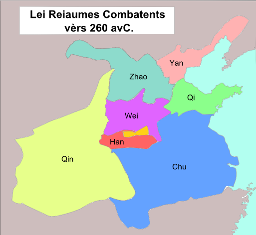 Reiaumes Combatents vèrs 260 avC.